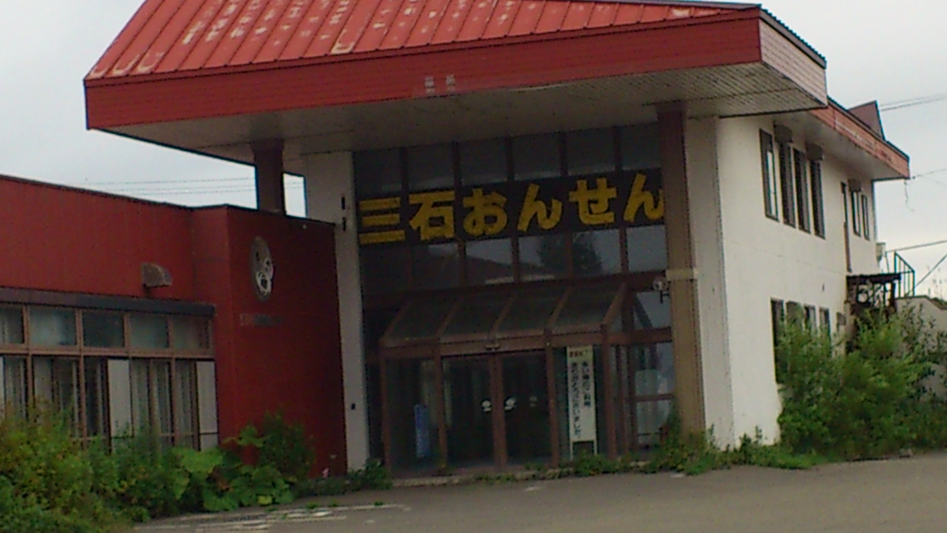 三石温泉の正面玄関です。 撮影日は2012年8月4日です。